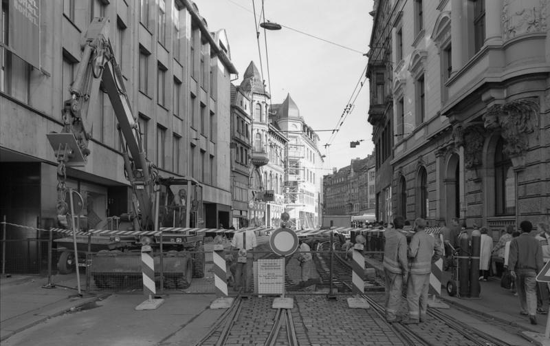 11.-18.8.1991 Bundesland Sachsen-Anhalt Halle, Gleisbauarbeiten in der Altstadt